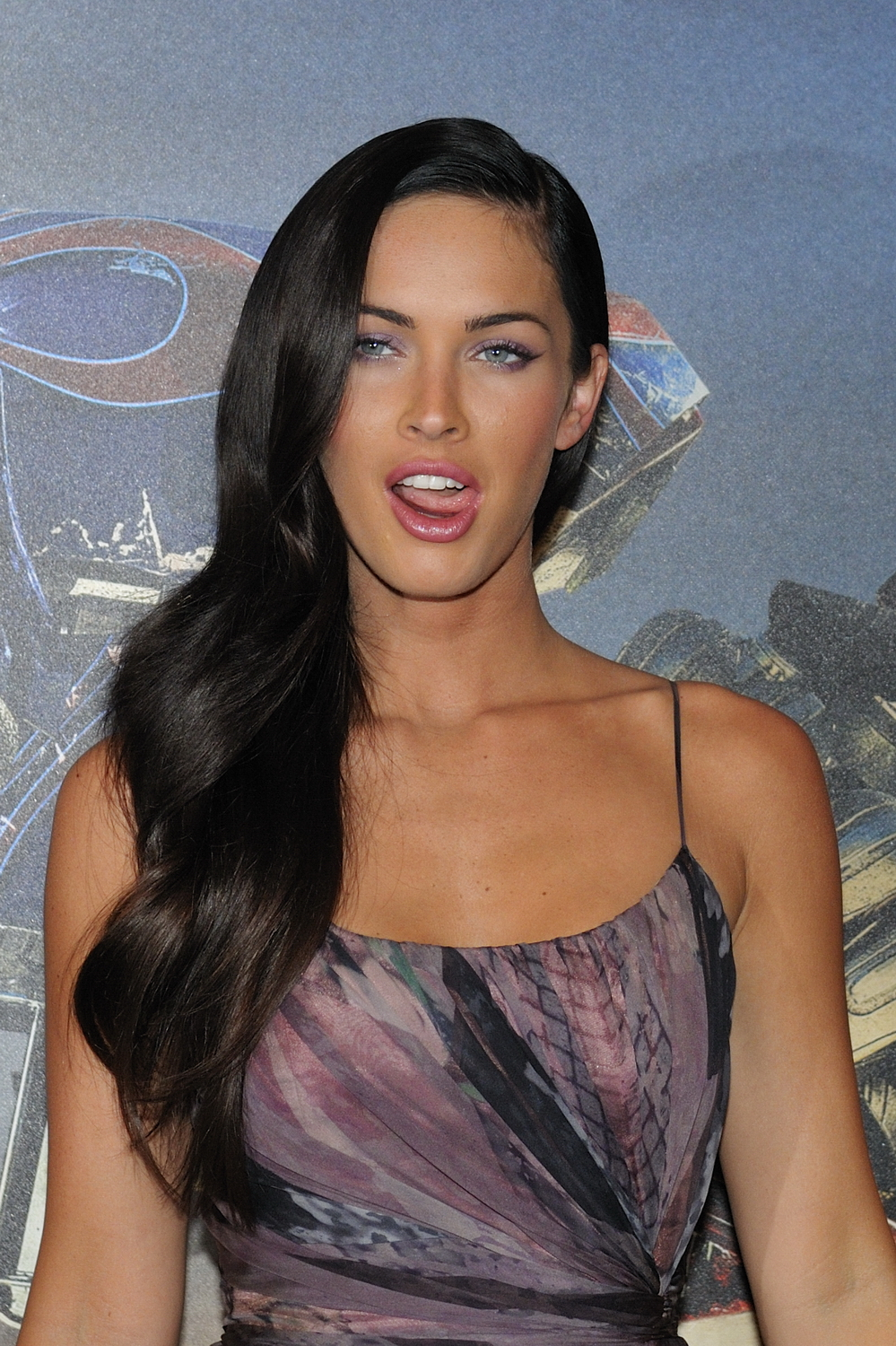 Megan Fox et Shia Labeouf au Georges V à Paris, pour la promo du film Transformers 2 : la revanche